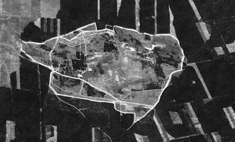 Dzisiejsze Radiowe Centrum Nadawcze Solec Kujawski sfotografowane przez amerykańskiego satelitę wywiadowczego Corona 98 (KH-4A 1023) w dniu 23 sierpnia 1965 r.